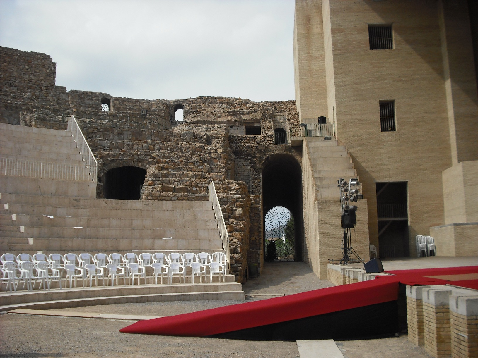 Orchaestra del teatre de Sagunt.